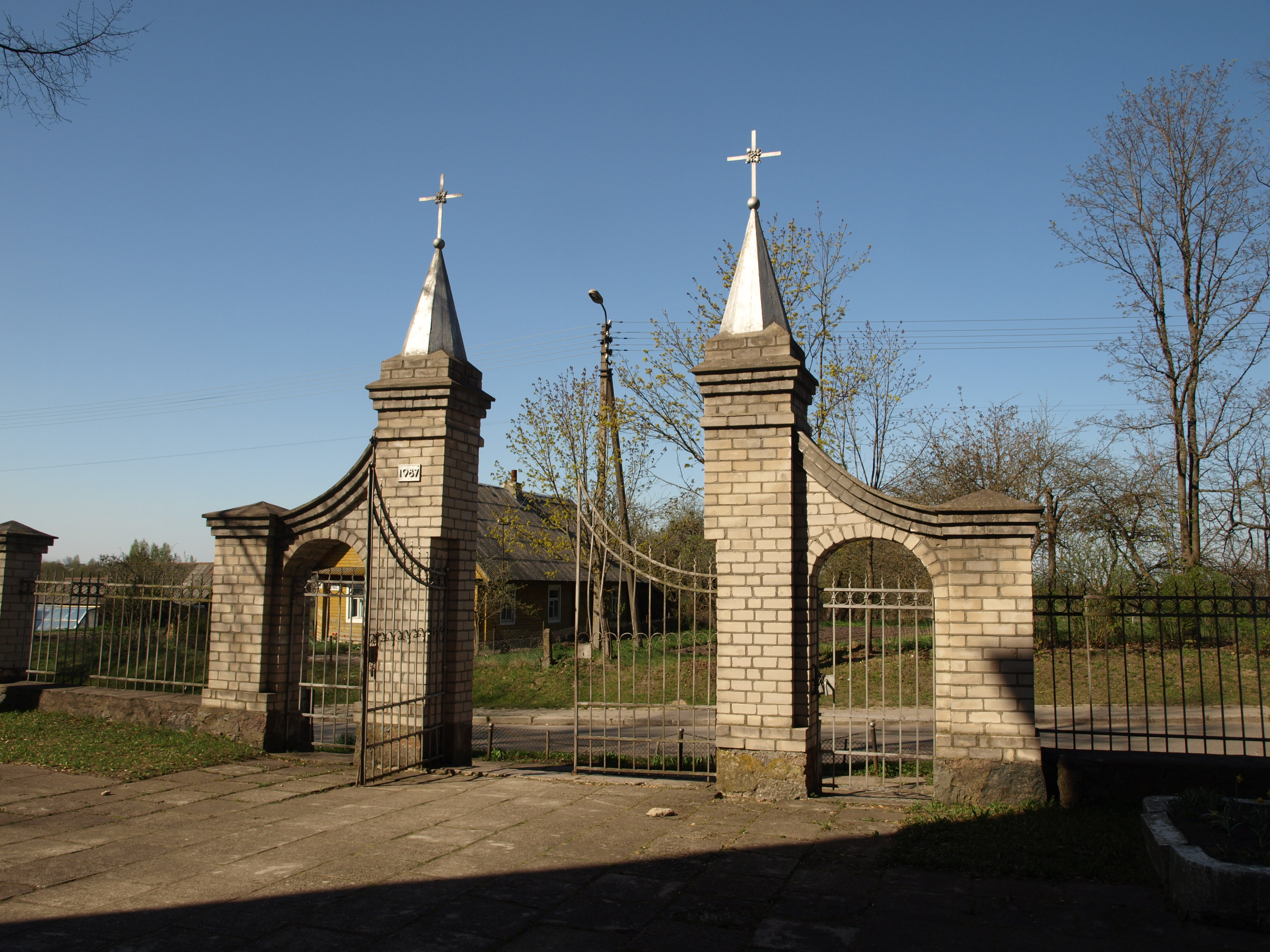 Adutiskis church